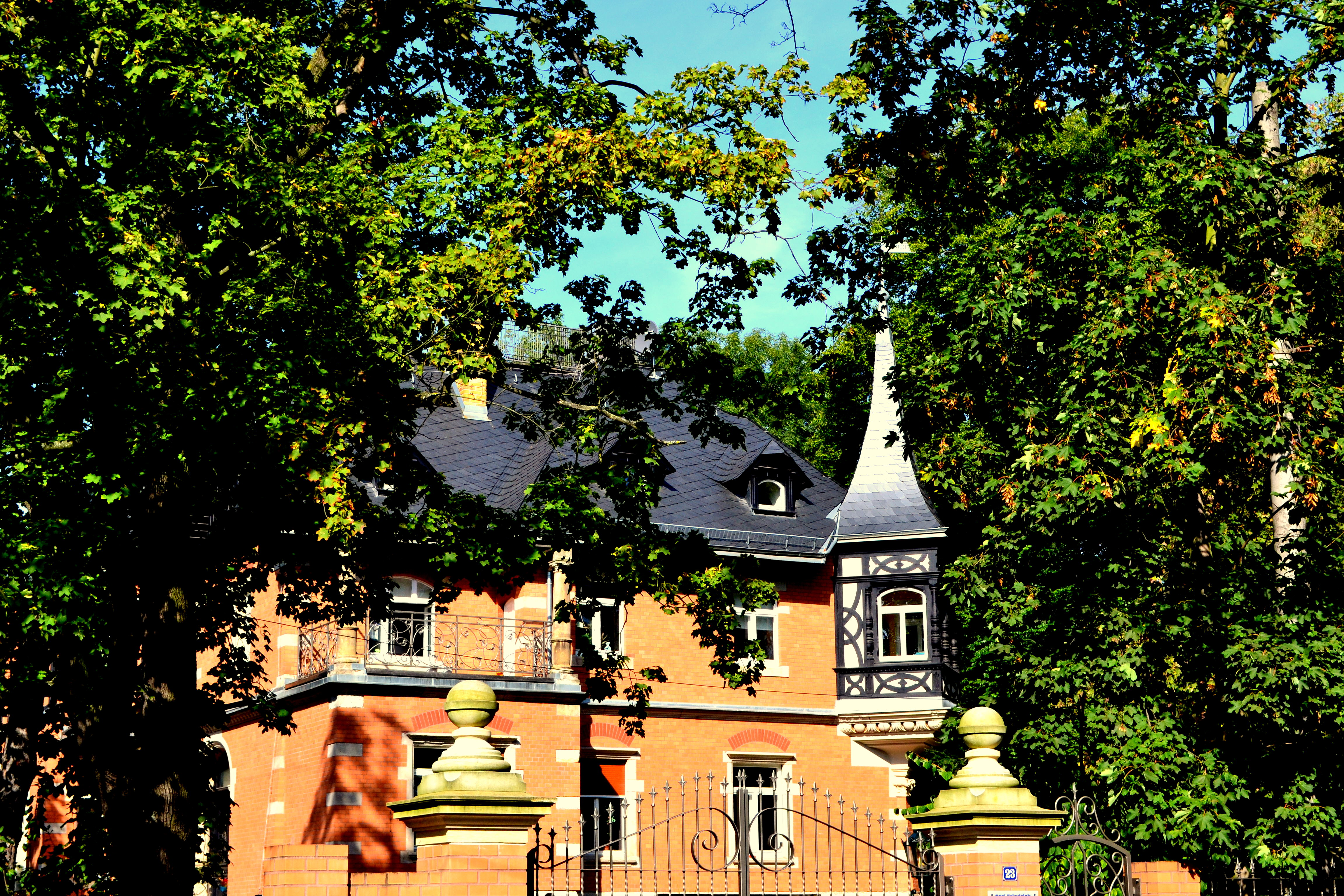 Haus in der Rathenaustraße 23, 04179 Leipzig Ehemaliges Wohnhaus von Carl Friedrich Goerdeler